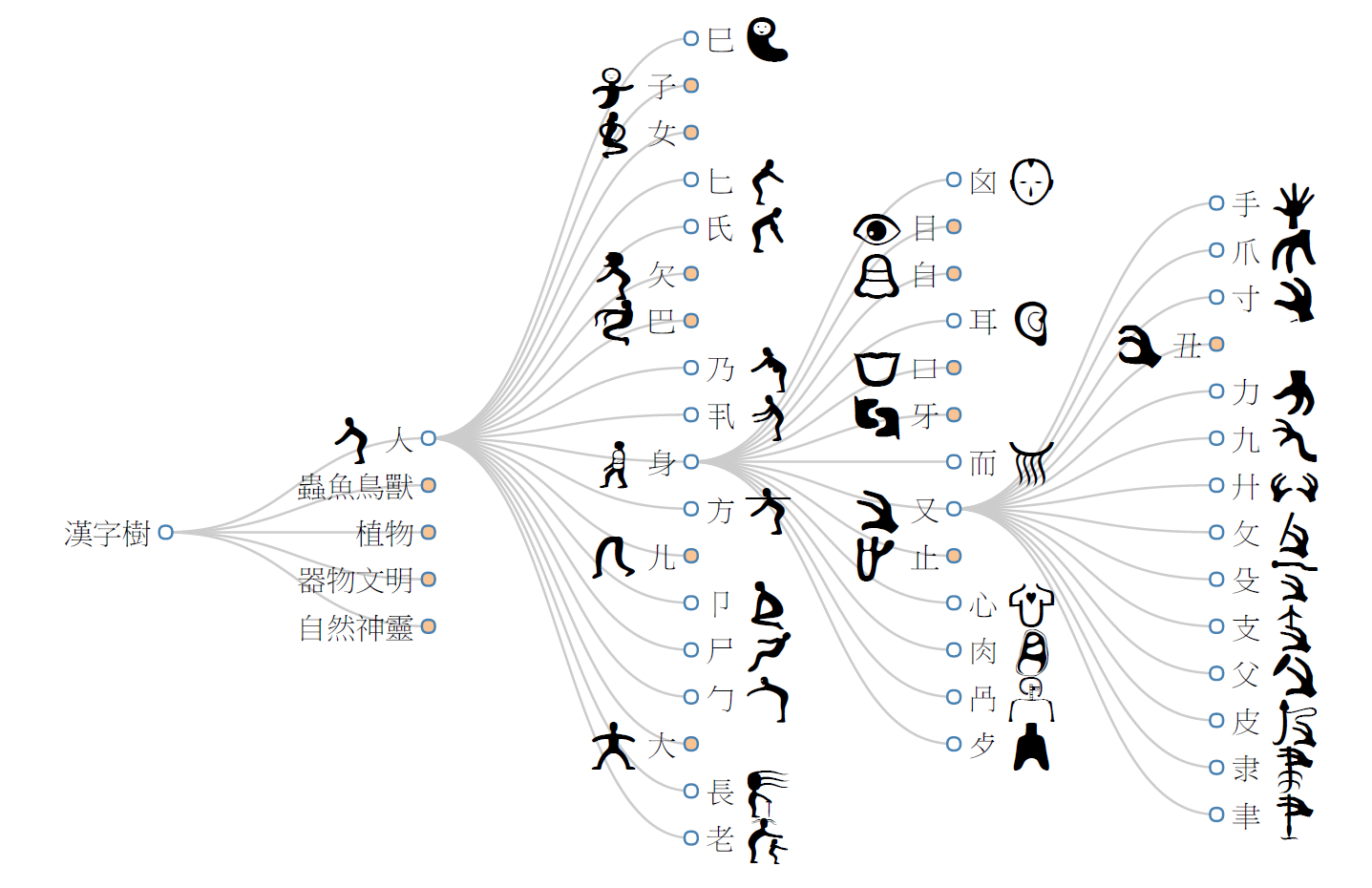 不同於以往的部首學習，將漢字用人、蟲魚鳥獸、植物、器物文明、自然神靈等五大類做分類，讓彼此之間產生關連性。